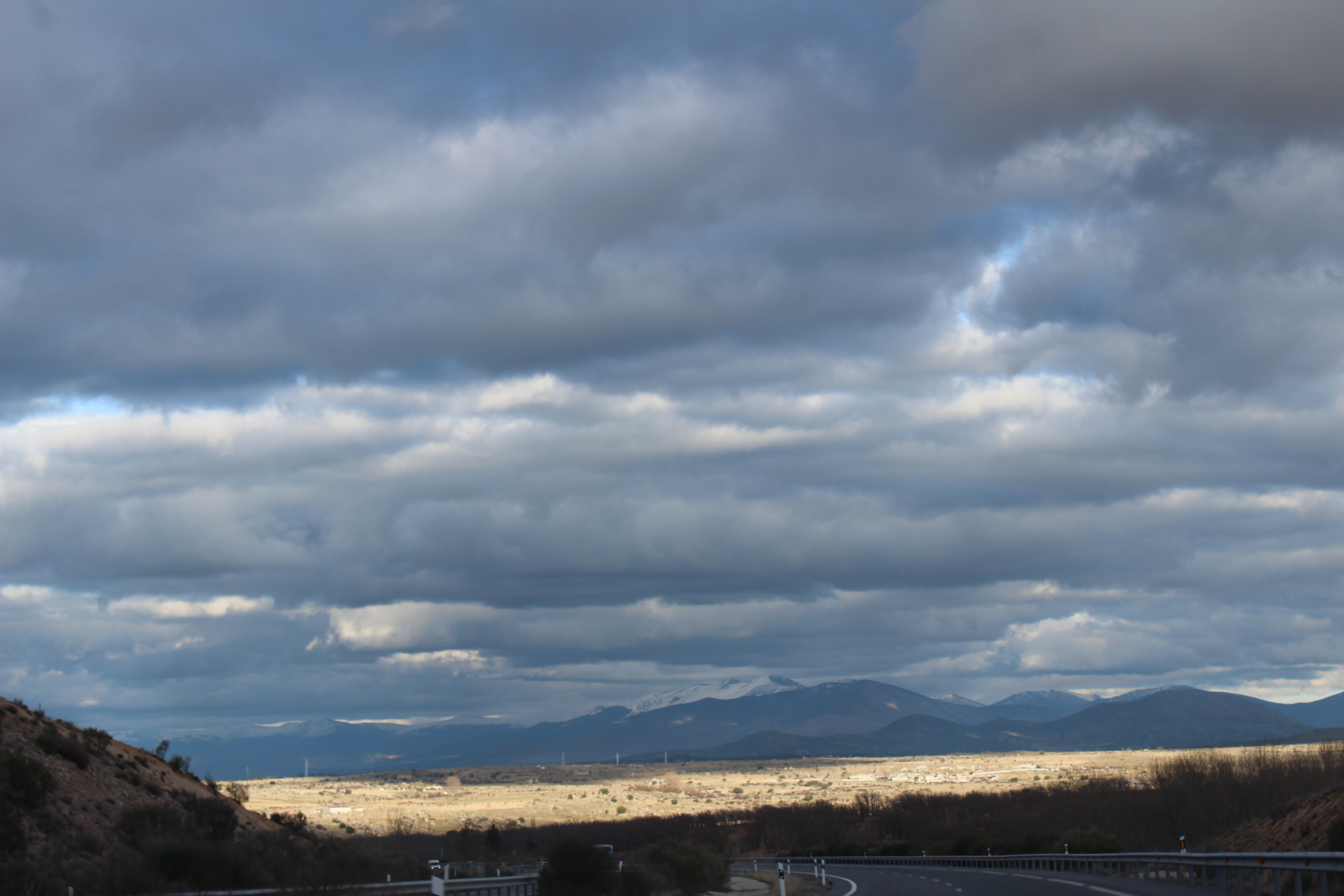 Paisagem montanhosa avistada na AP-51 em direcção a Madrid.